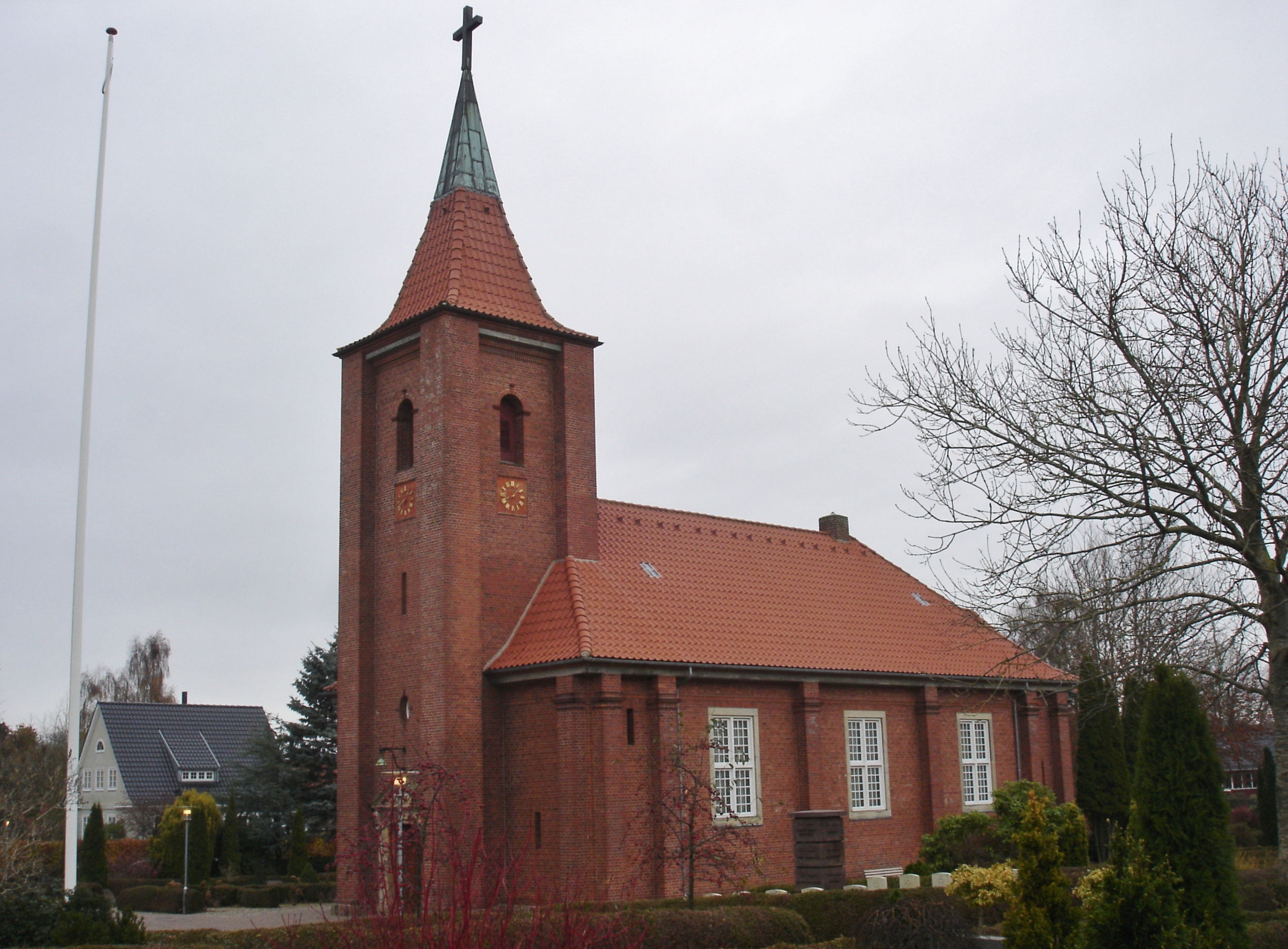 Aalestrup Kirke fra SV